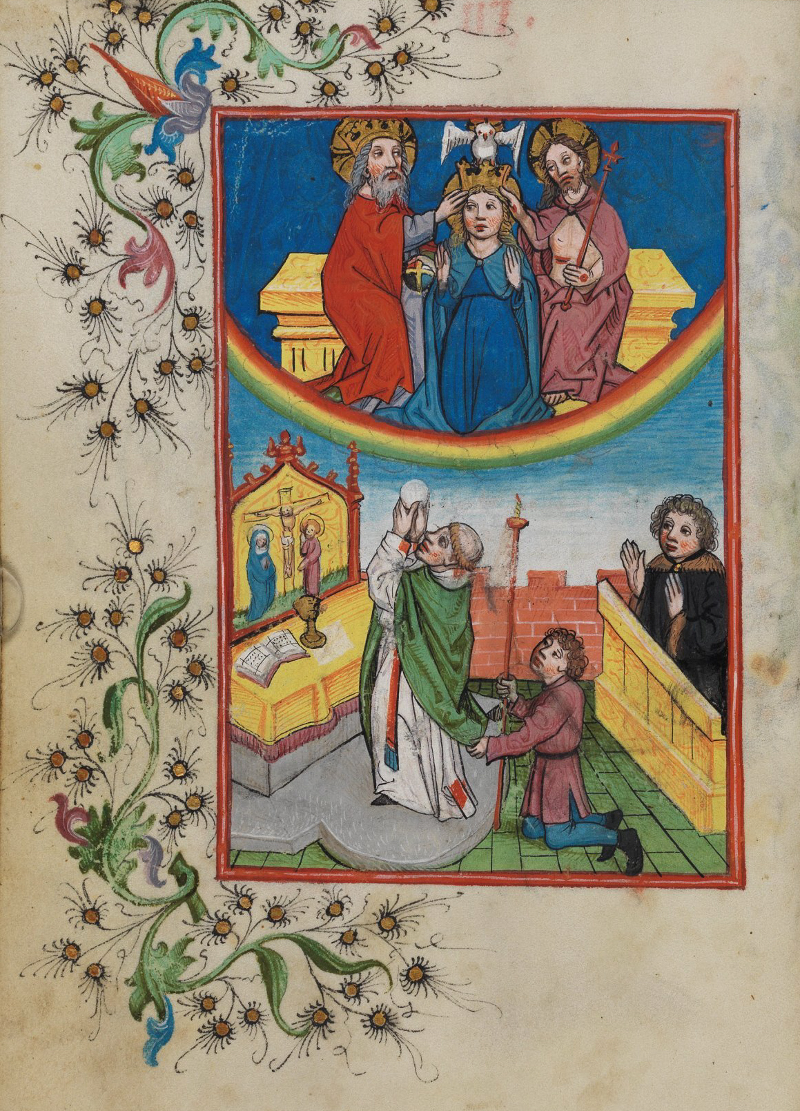 Illuminierte Seite aus dem Waldburg-Gebetbuch, WLB Stuttgart, Cod. brev. 12, fol. 16v